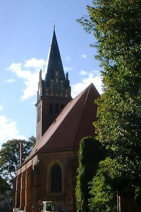 Kirche in Bad Liebenwerda, Deutschland.